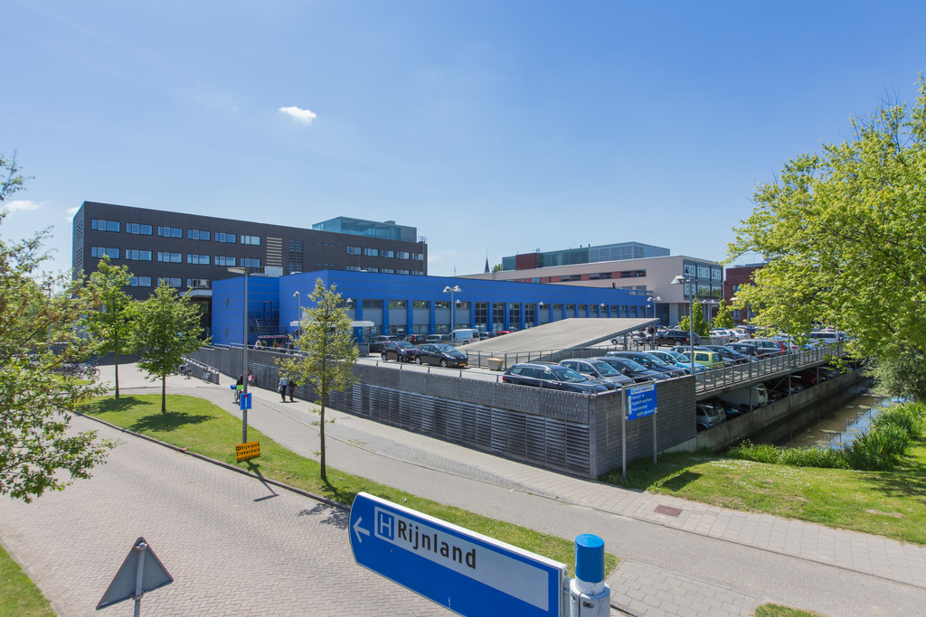 Rijnland Ziekenhuis locatie Alphen aan den Rijn